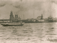 Місто Камизяк у 19 столітті